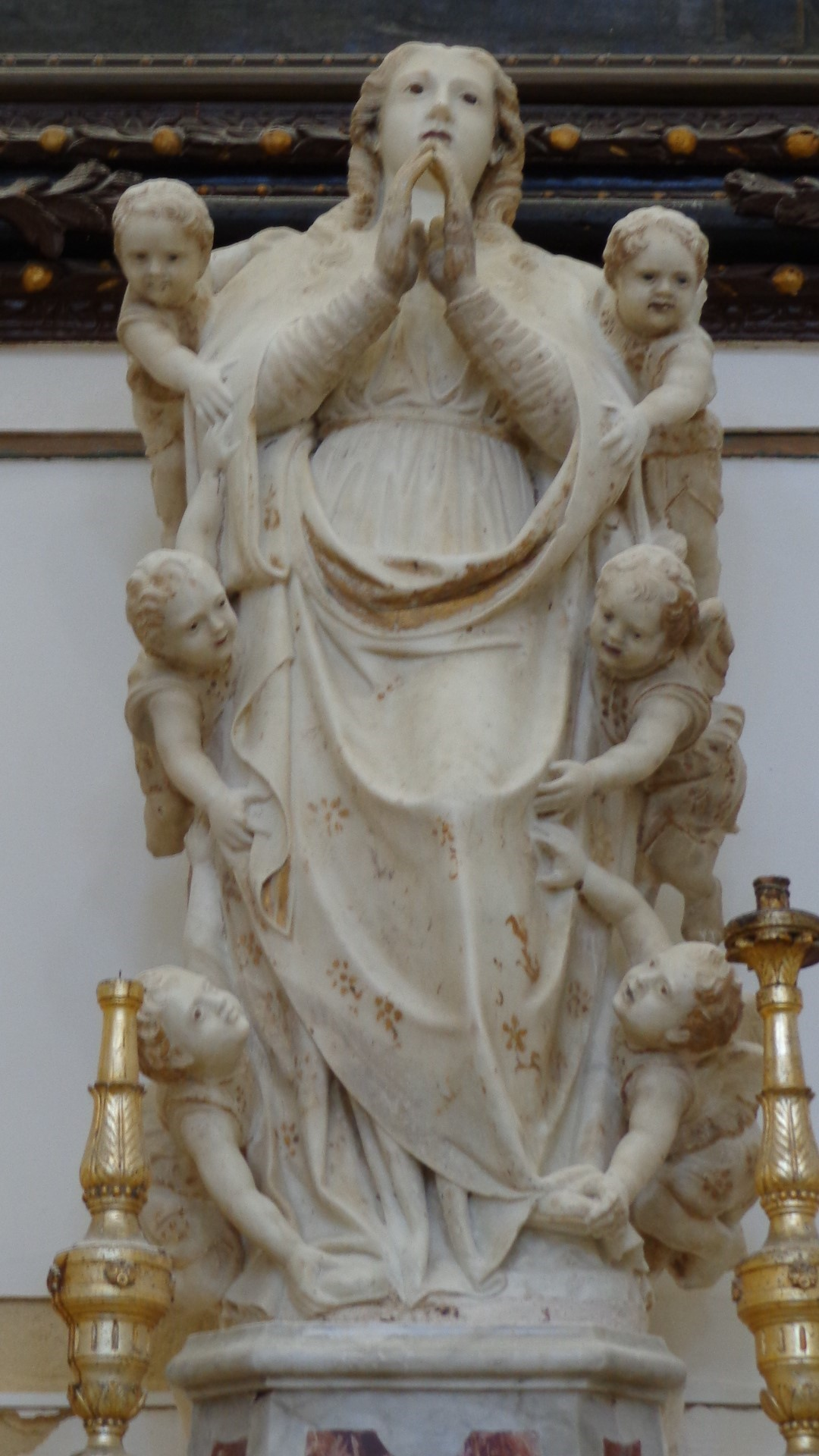 Scultura Assunzione di Maria